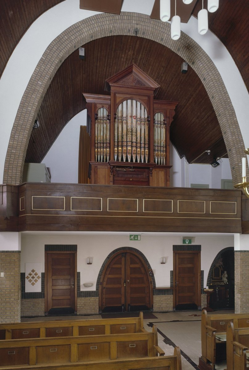 O.K. Parochie Heilige Georgius: Interieur, aanzicht orgel, orgelnummer 48 (opmerking: Gefotografeerd voor Het Historische Orgel in Nederland 1865-1872)